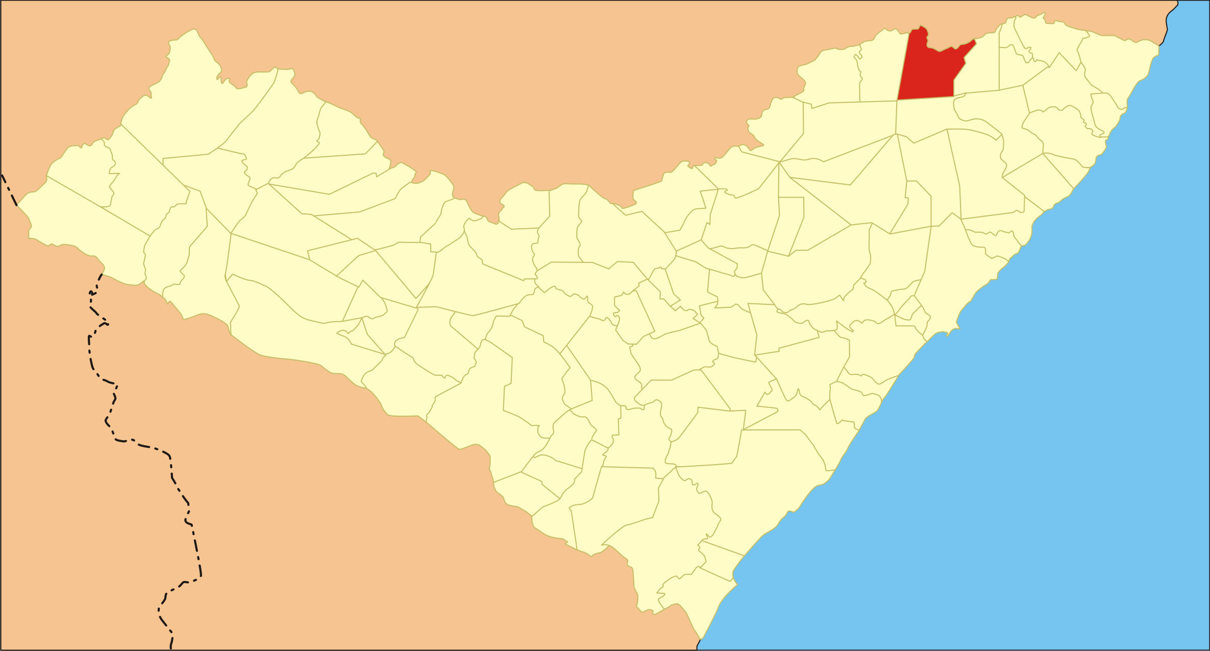 Localização da cidade em Alagoas